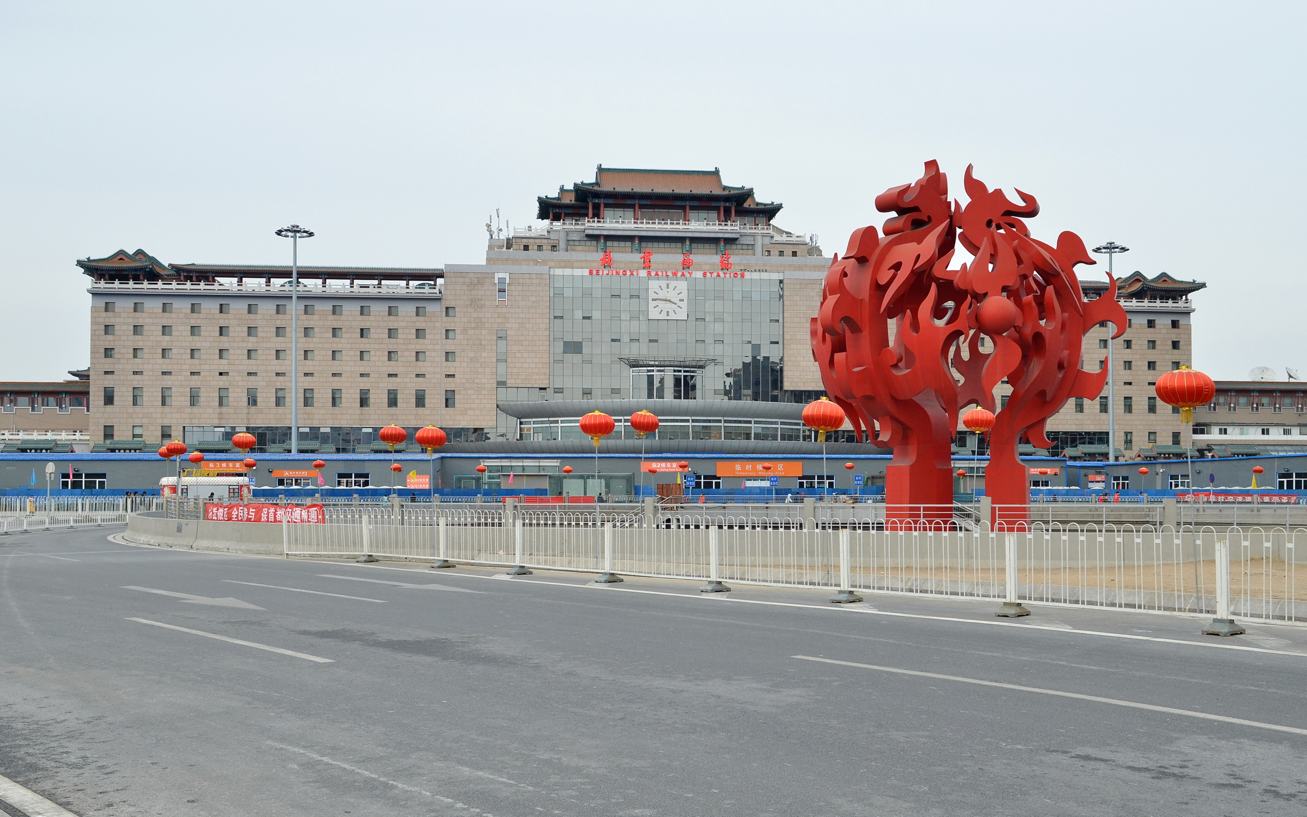 中文（中国大陆）: 北京西站南站房